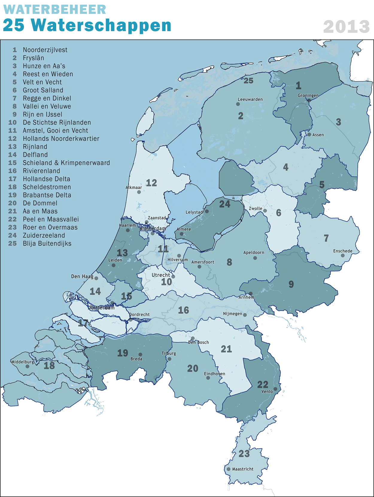 Waterschappen in Nederland, situatie per 1-1-2013.